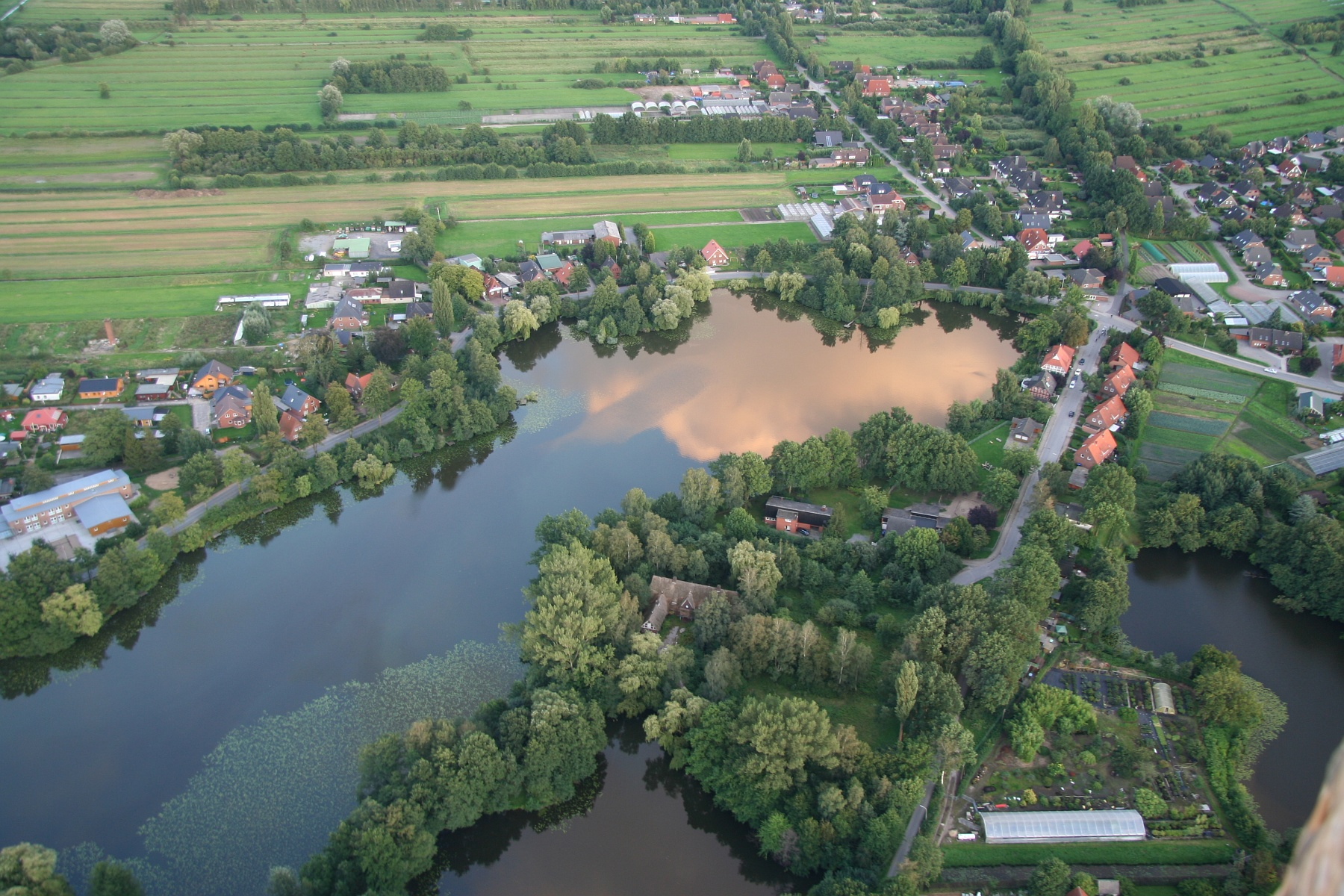 Fünfhausen